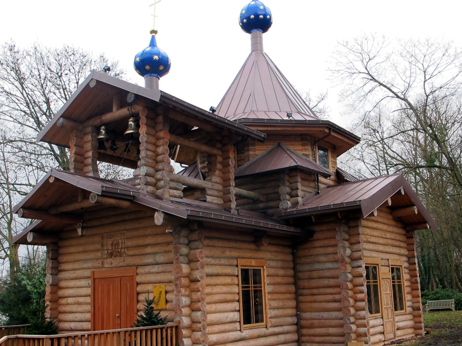 Eglise en bois